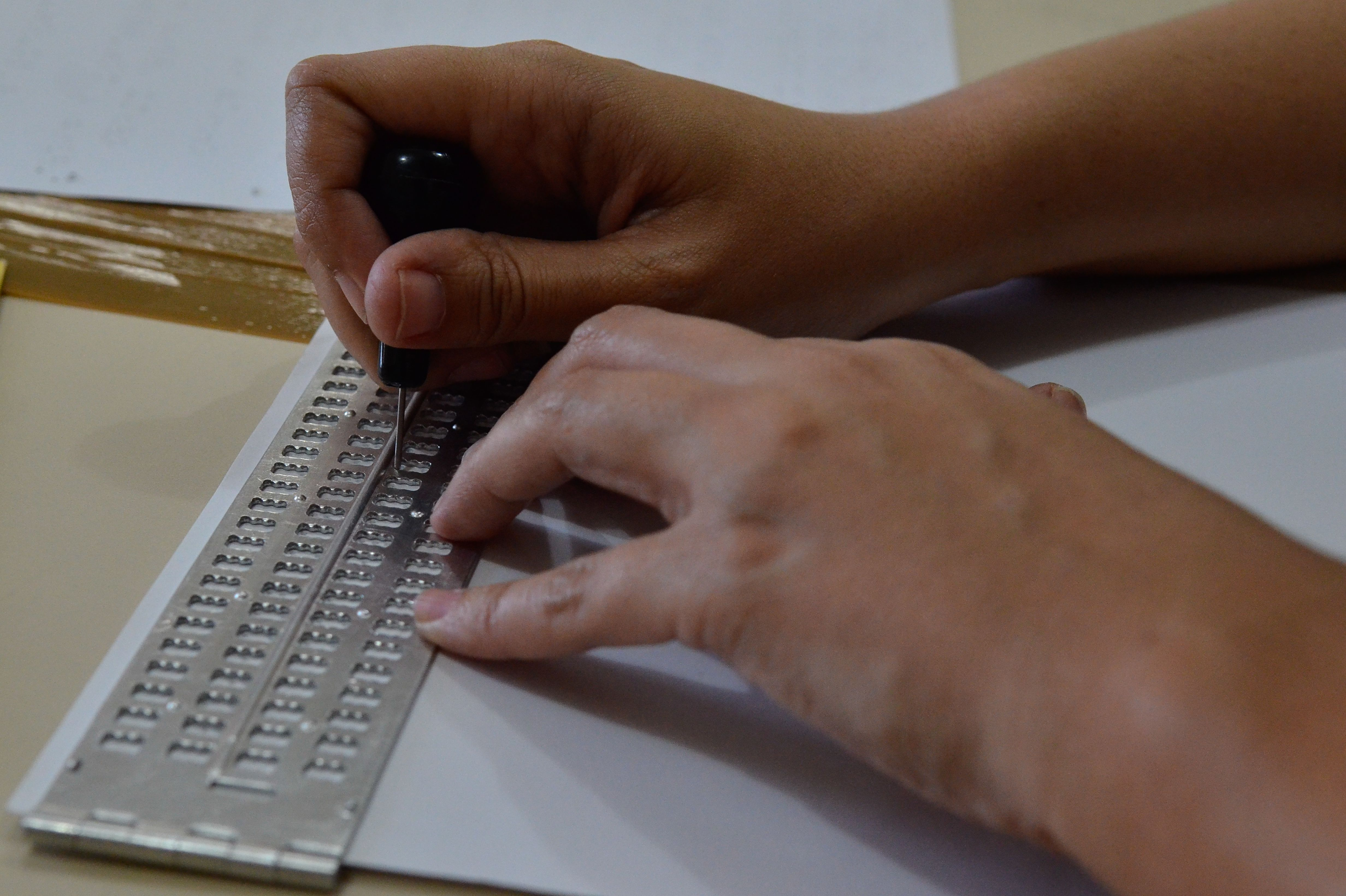 Professora aprendendo o braille.